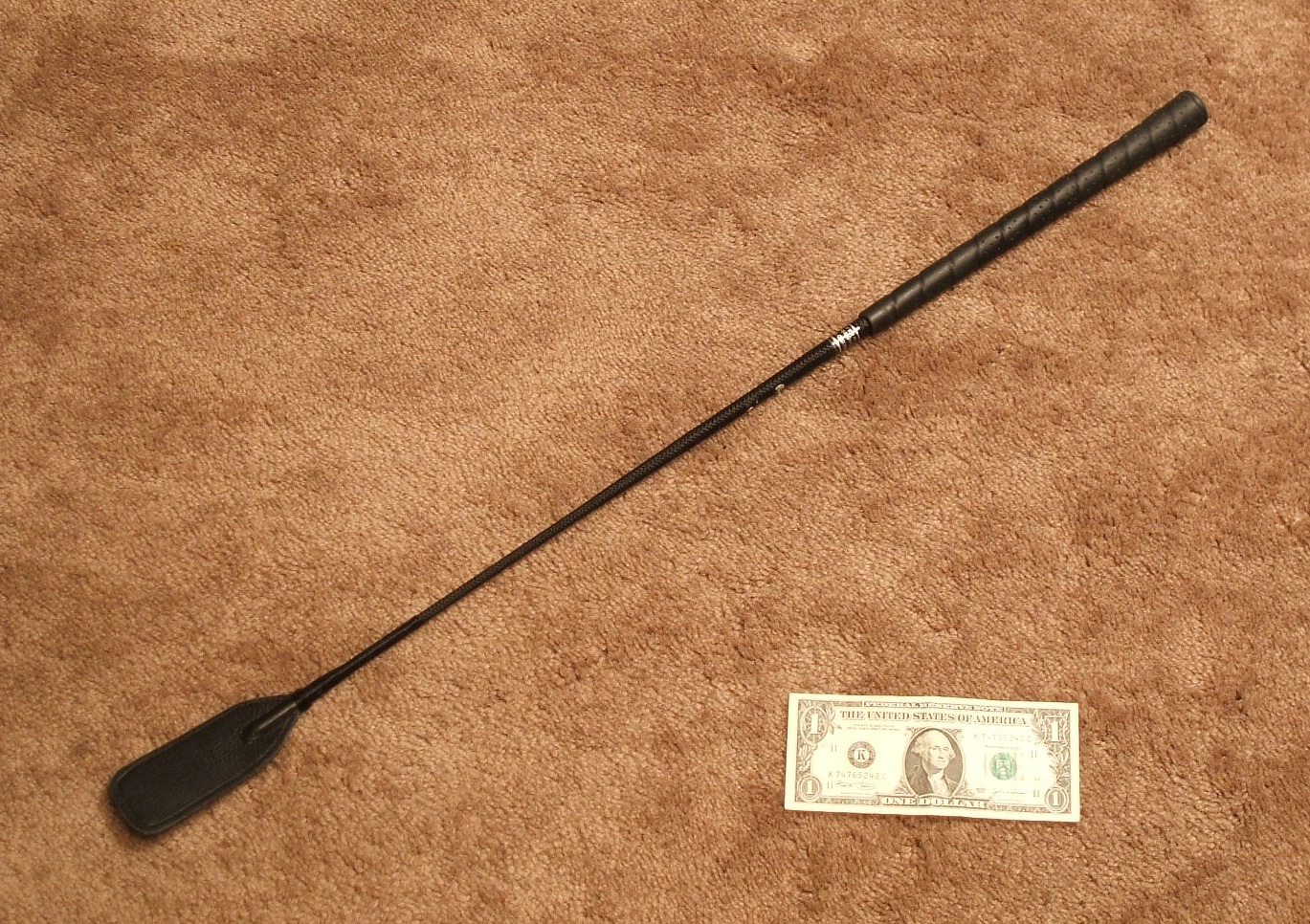 Cravache. Photographie prise à Mississauga, Ontario, Canada. Summary A 30" (75cm) riding crop. I, User:OwenX, photographed this on 30 December 2005 in Mississauga, Ontario, Canada using a Fujifilm FinePix F440 digital camera. I am hereby licensing this image to the Wikimedia Foundation in perpetuity under the terms of GFDL. Bild:Riding crop.JPG